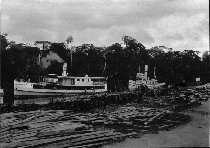 Foto. omgeving SURALCO, Surinaamse bauxietmaatschappij. Het passagiersschip Nieuw Amsterdam en de sleepboot Cockatara op de Cotticarivier in Suriname.